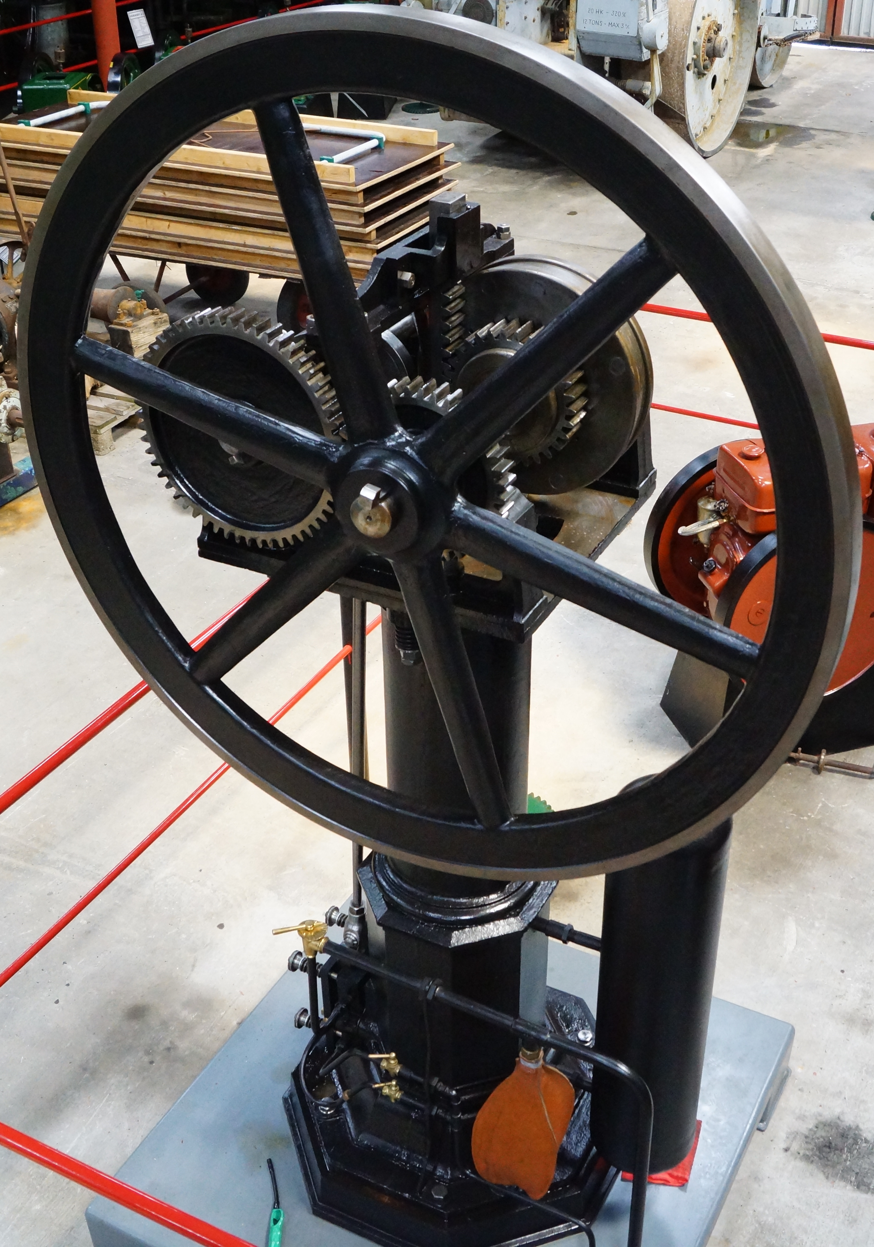 Otto & Langen